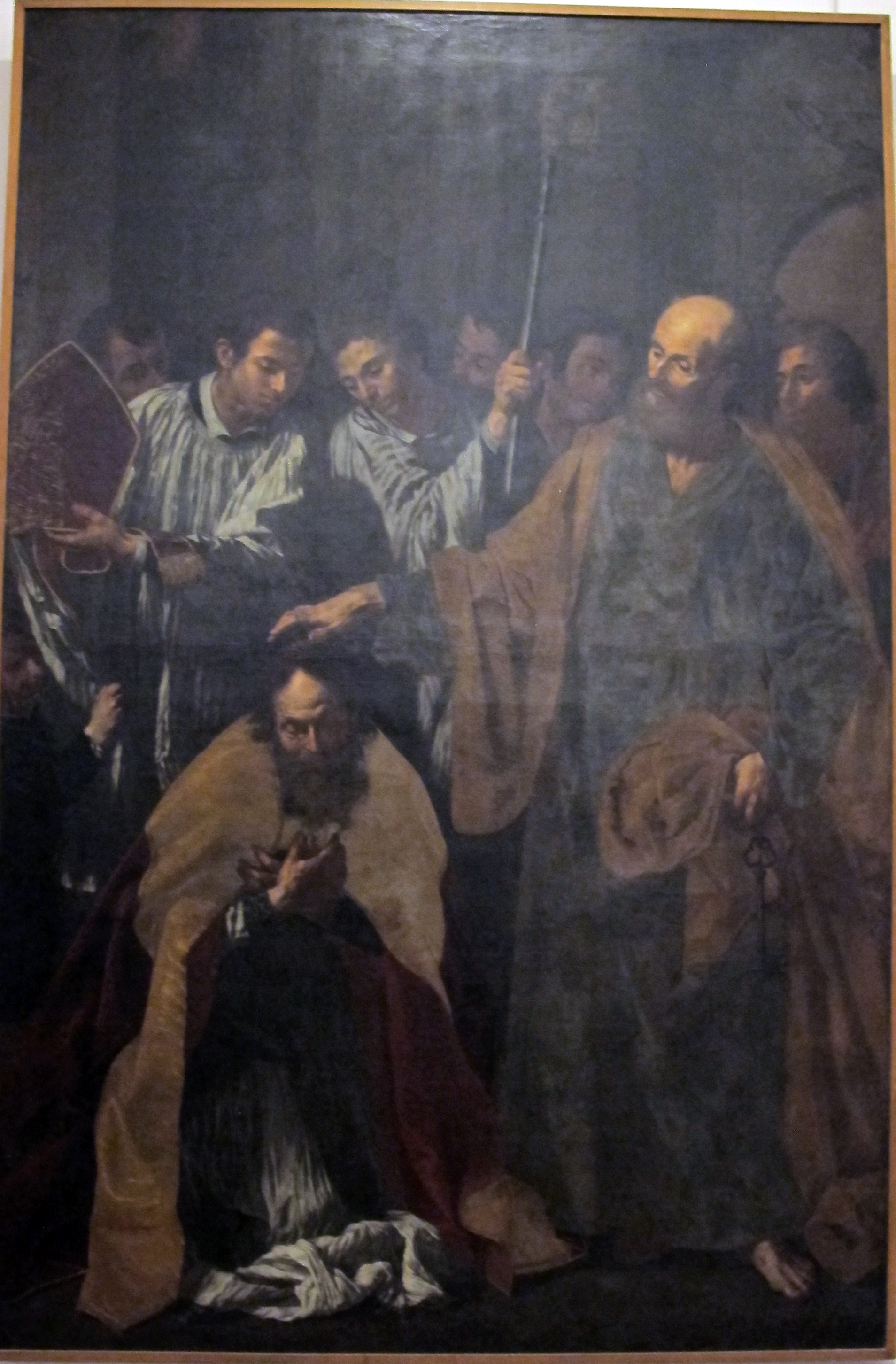 Galleria Napoletana (Museo di Capodimonte)